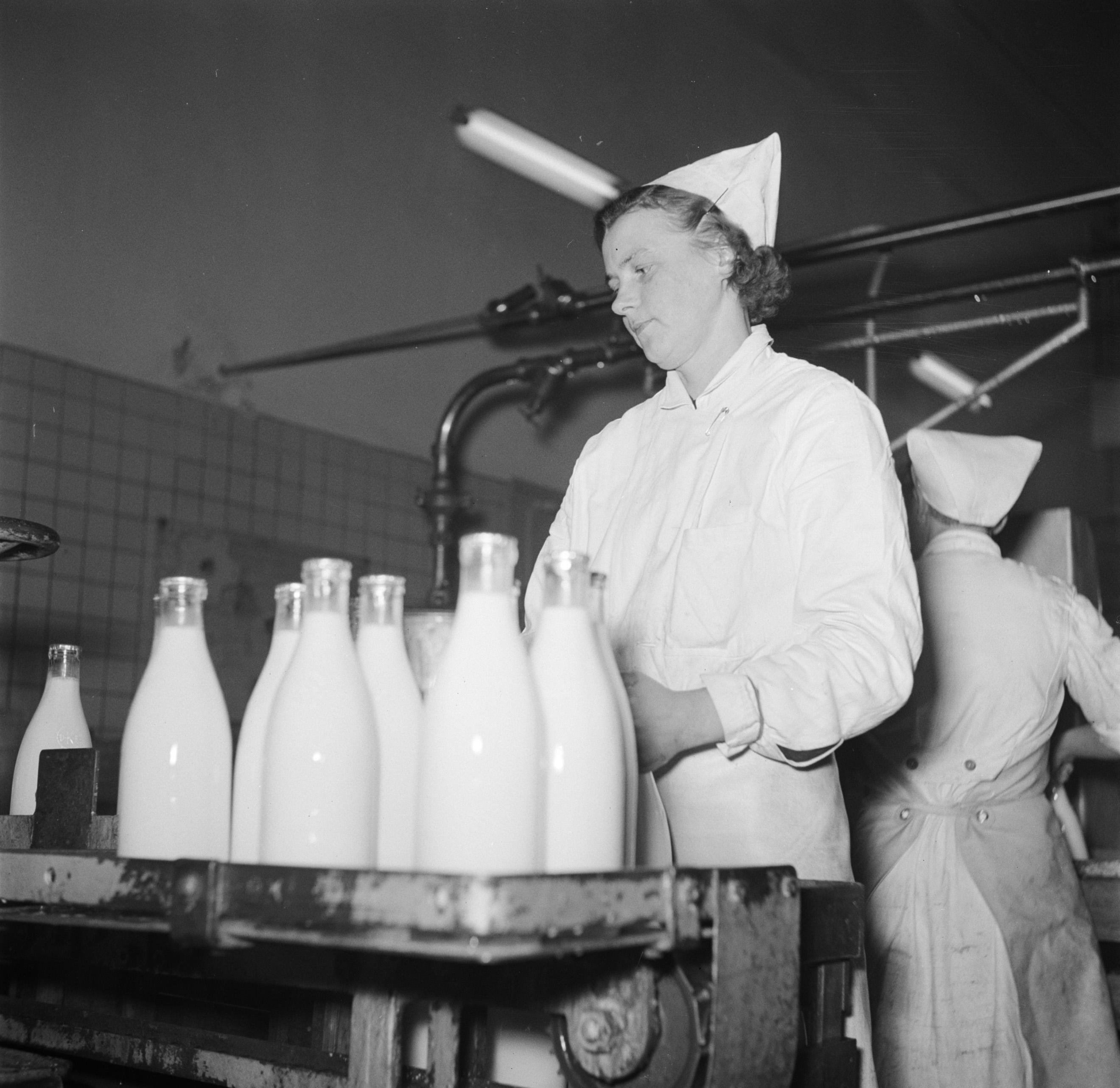 Collectie / Archief : Fotocollectie Van de Poll Reportage / Serie : Melkfabriek in Denemarken Beschrijving : Arbeidsters aan de lopende band waar de melkflessen worden gevuld Datum : maart 1954 Locatie : Denemarken Trefwoorden : arbeiders, lopende banden, machines, mechanisatie, melk, melkbussen, melkfabrieken, melkflessen Fotograaf : Poll, Willem van de, [onbekend] Auteursrechthebbende : Nationaal Archief Materiaalsoort : Negatief (zwart/wit) Nummer archiefinventaris : bekijk toegang 2.24.14.02 Bestanddeelnummer : 252-9075